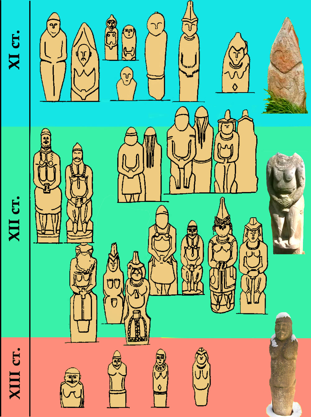 Kipchak stone statues(Ukraine)